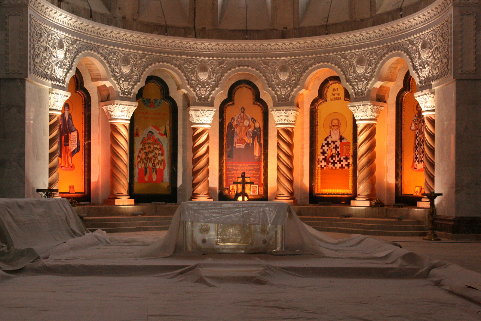 Interieur de la Cathedrale Saint Sava à Belgrade